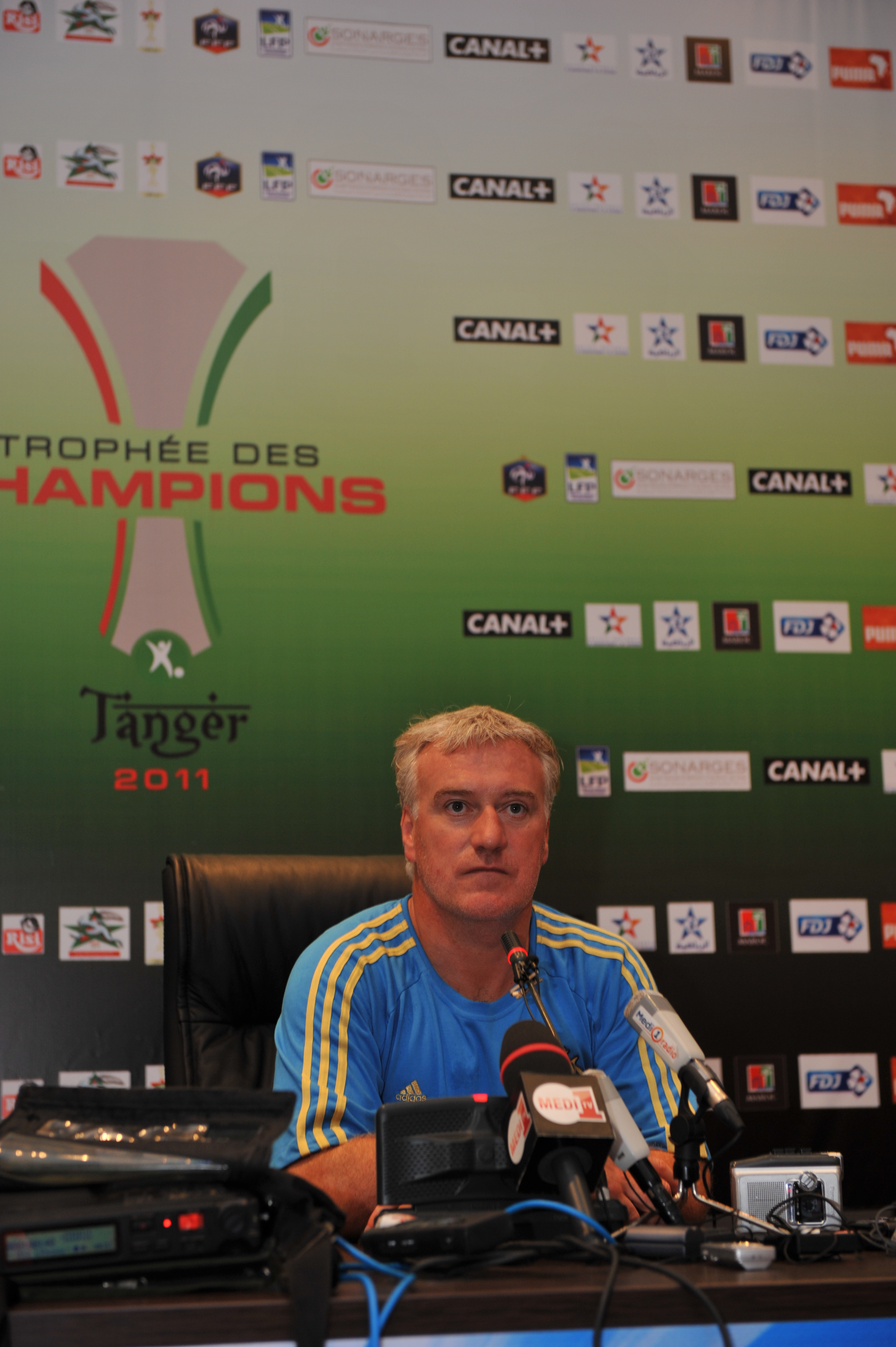 L'entraîneur de l'Olympique de Marseille Didier Deschamps, lors du Trophée des Champions 2011.